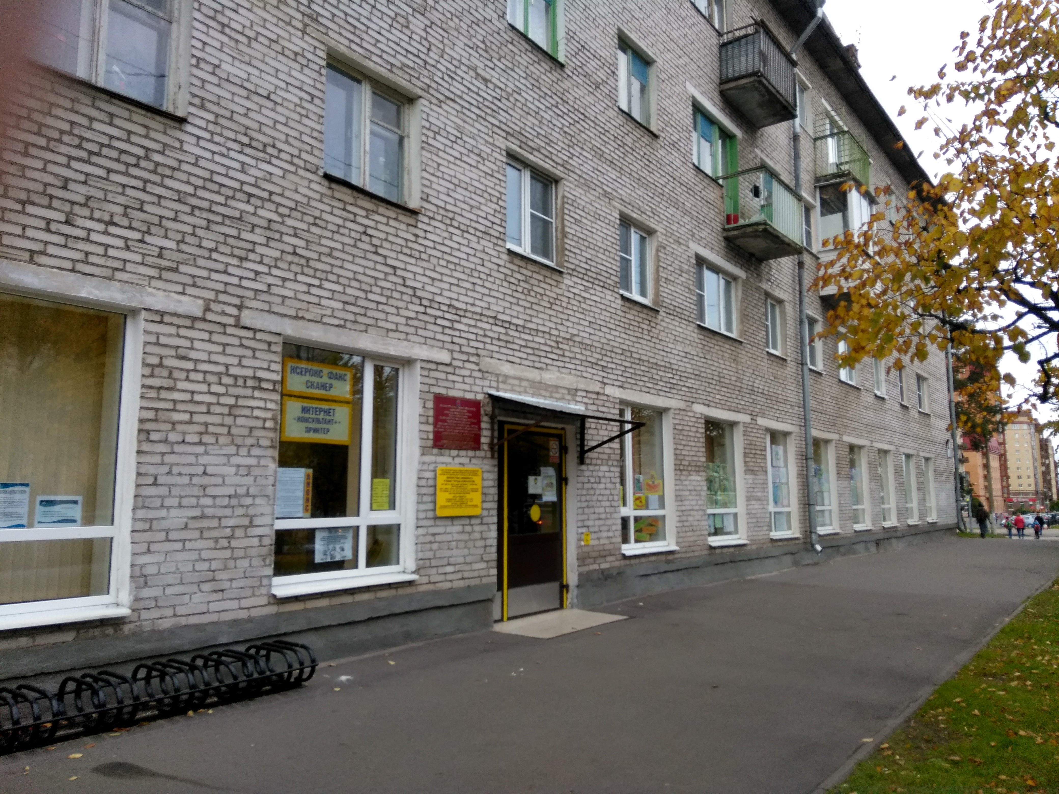 Библиотека семейного чтения города Ломоносова